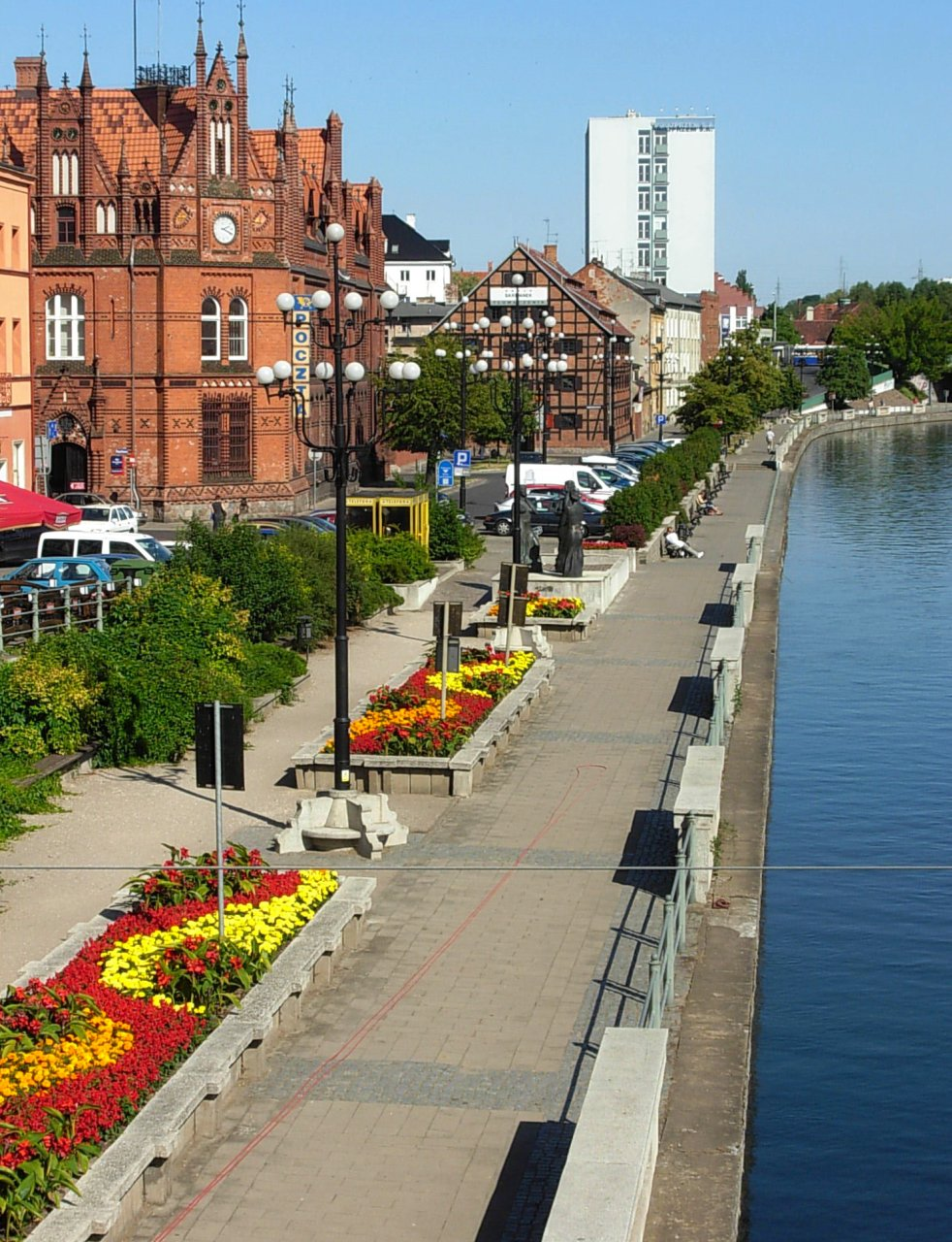 Ulica Stary Port w Bydgoszczy